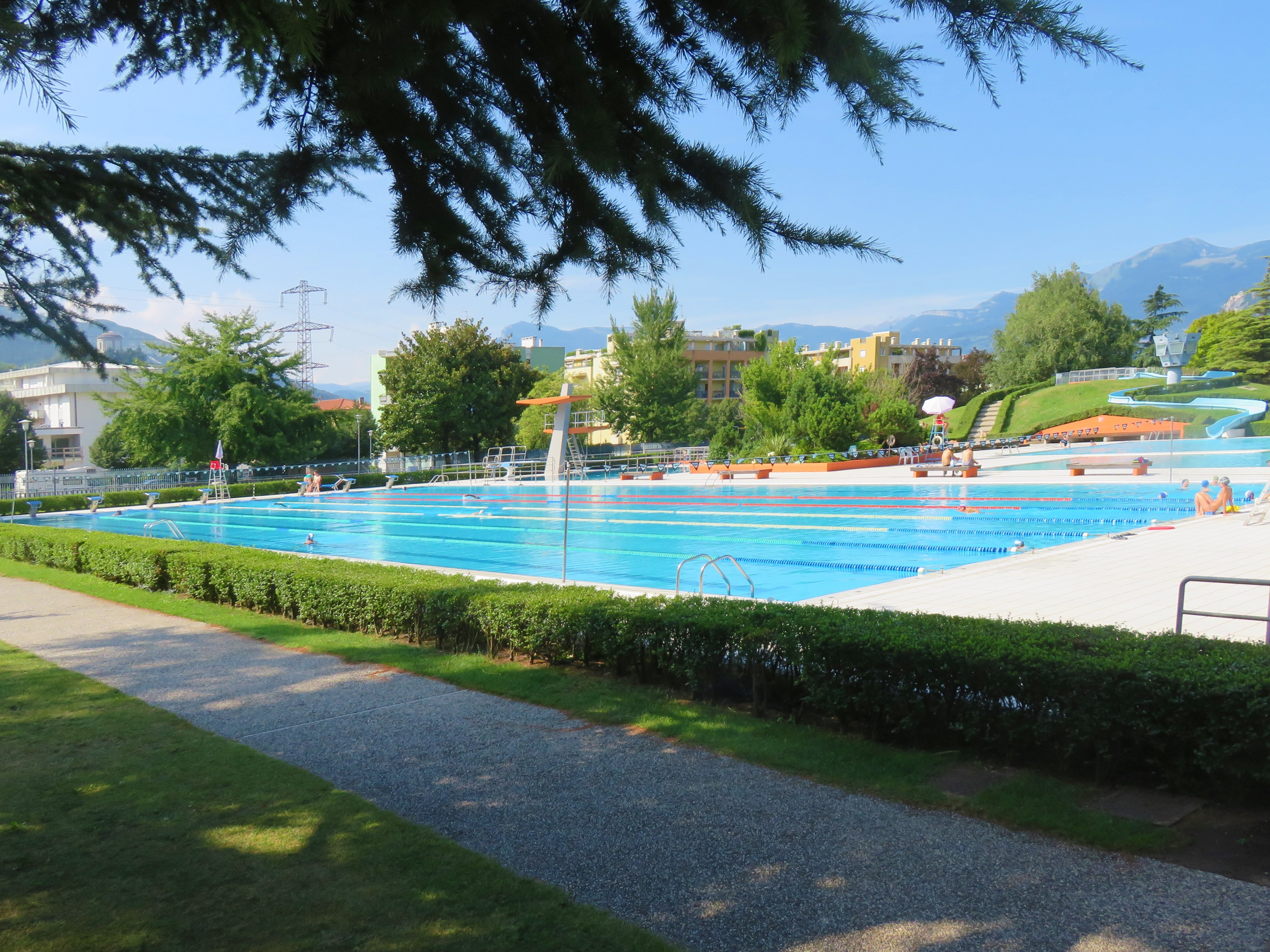 Centro natatorio Rovereto - Vasca olimpionica scoperta